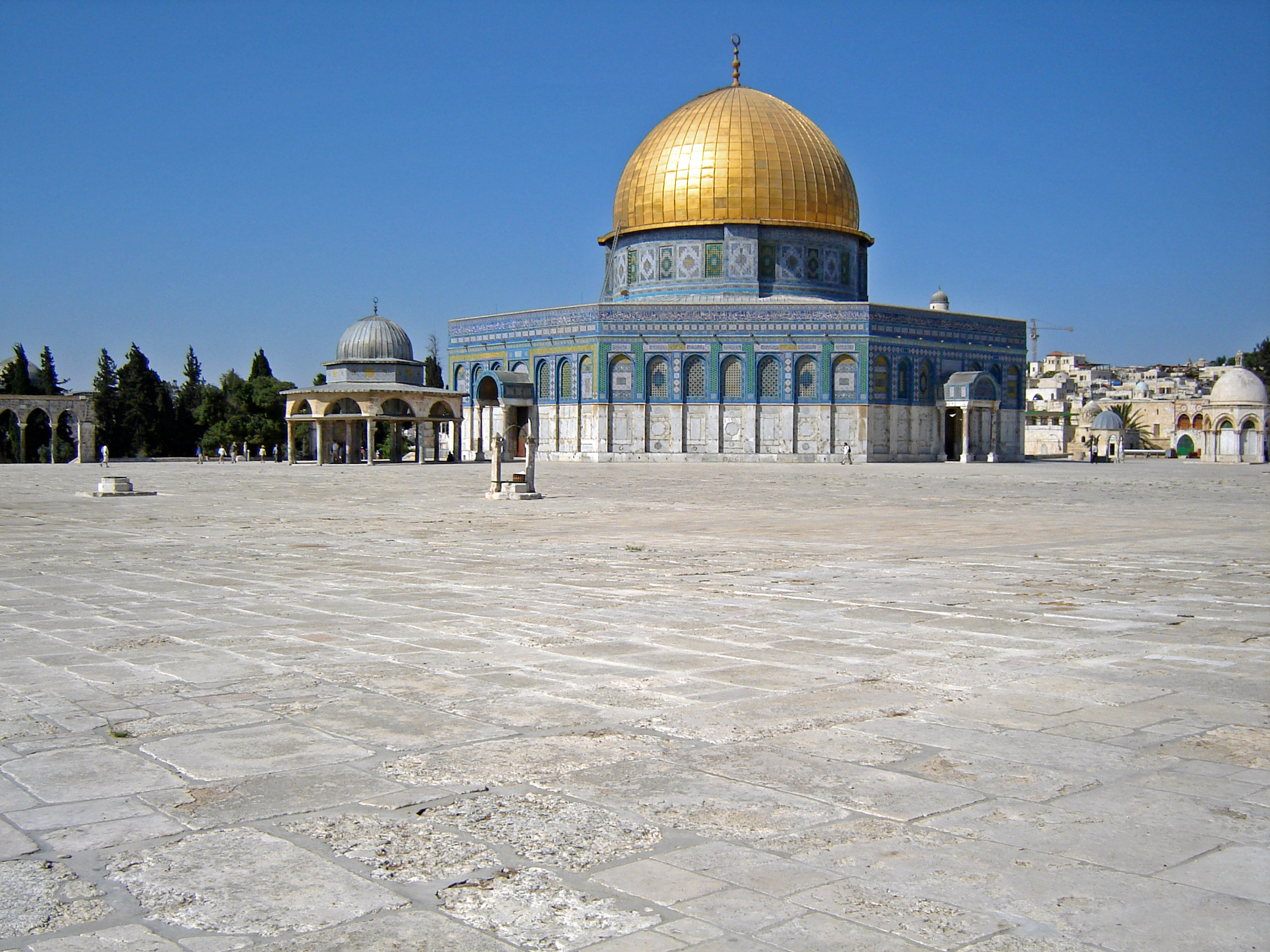 Der Felsendom mit dem Kettendom 2006. Foto Orientalist 7-2006 Aufgenommen aus der Perspektive von Bonfils.